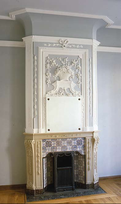 Sierstucwerk schouw Gagini-Zimmer Couvenmuseum, Aken (D). Stucwerk door Petrus Nicolaas Gagini